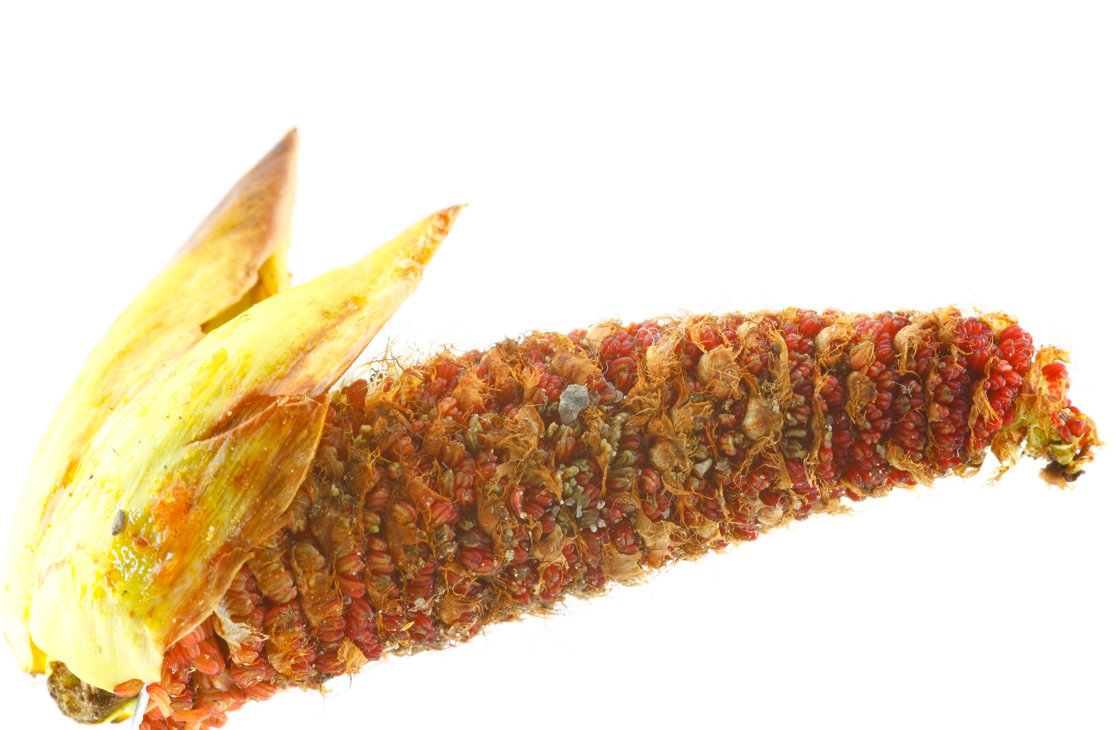 Die weiblichen Kätzchen einer Schwarzpappel